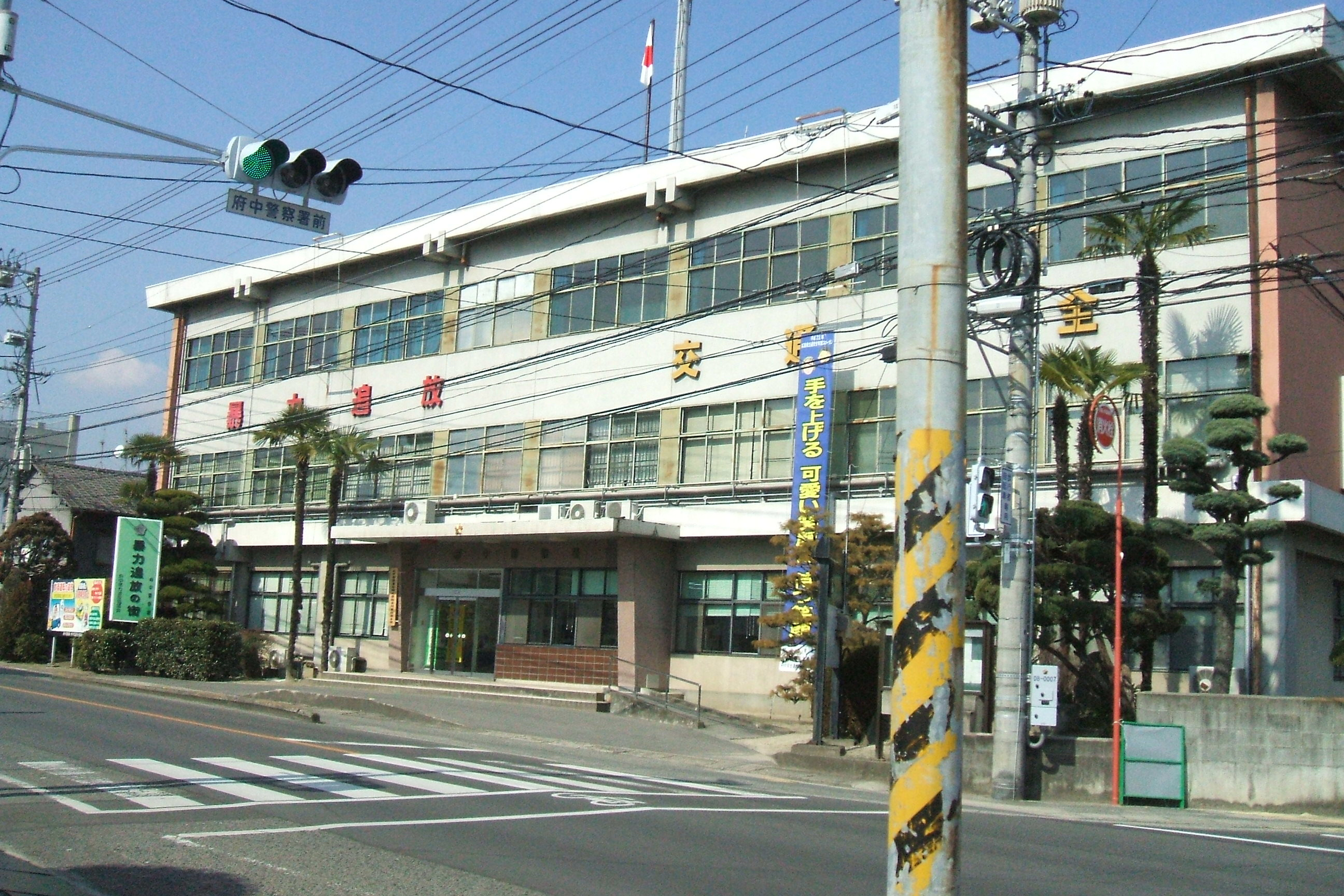 広島県府中市にある広島県警察府中警察署の庁舎